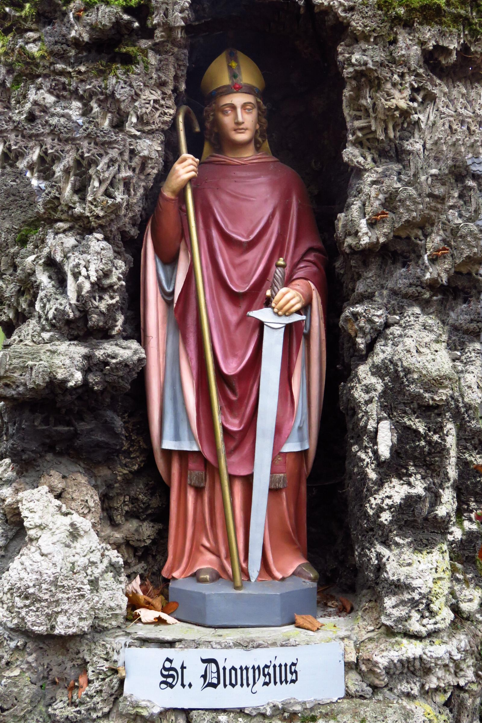 Grottenanlage in Hehn Heiligenpesch / Christliche Figuren in Mönchengladbach